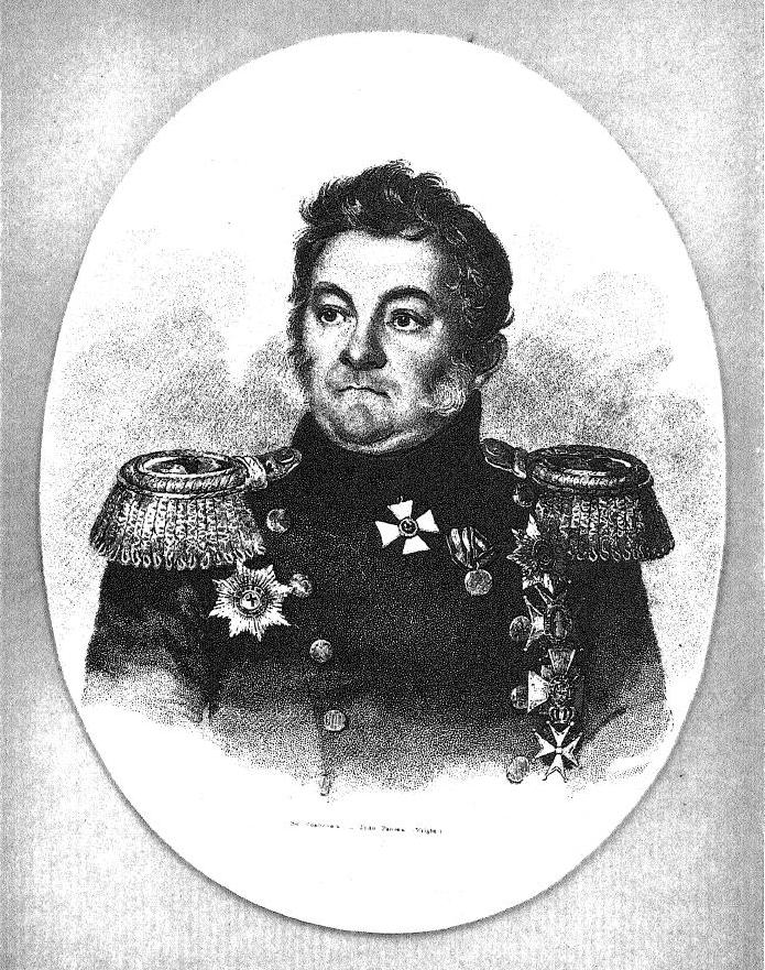 Гейден, Логин Петрович (русский адмирал голландского происхождения)